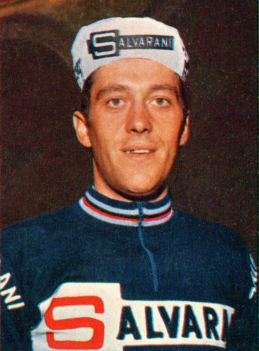 SPRINT '71 - PANINI - Figurina-Sticker n. 13 - A. HOUBRECHTS - BELGIO - Rec